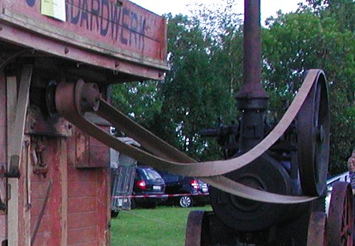 'Transmissionsriemen zum Antrieb einer Dreschmaschine durch eine Lokomobile bei der Moorseer-Mühle in Nordenham